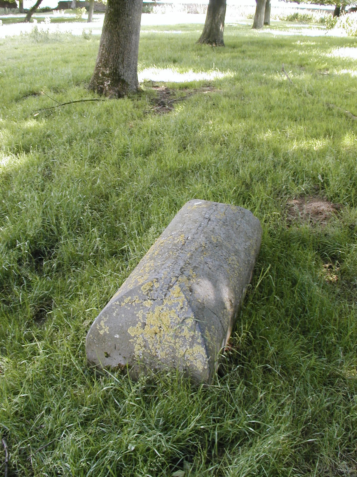 Pierre tombale du sergent Cotton, dans le jardin d'Hougoumont